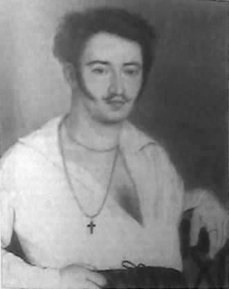 Пётр Александрович Нащокин (1793—1864)